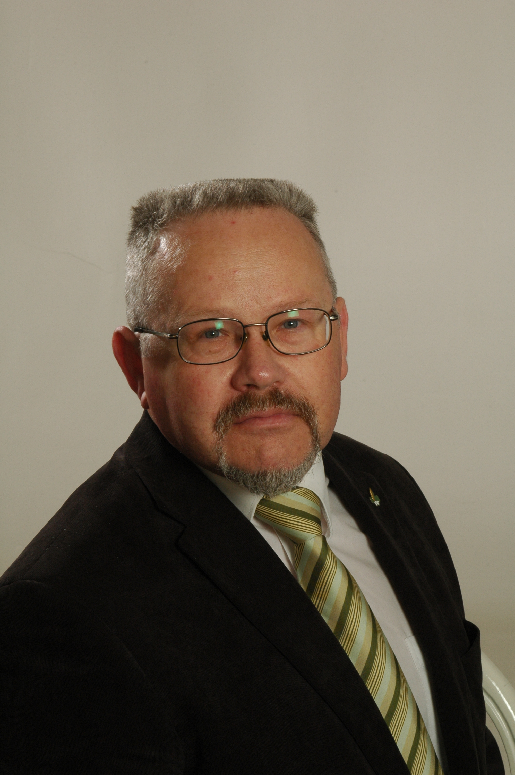 10.Saeimas deputāts Vitauts Staņa